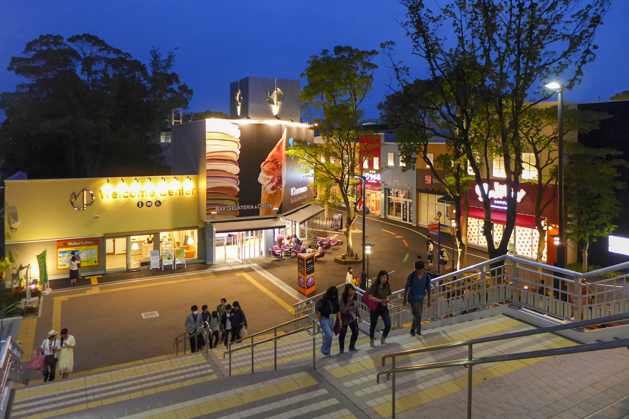 Maker’s Pier Overview